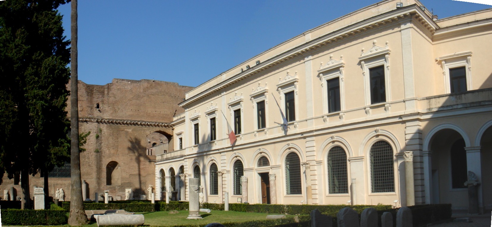 Roma, Terme di Diocleziano: ingresso al Museo Nazionale Romano